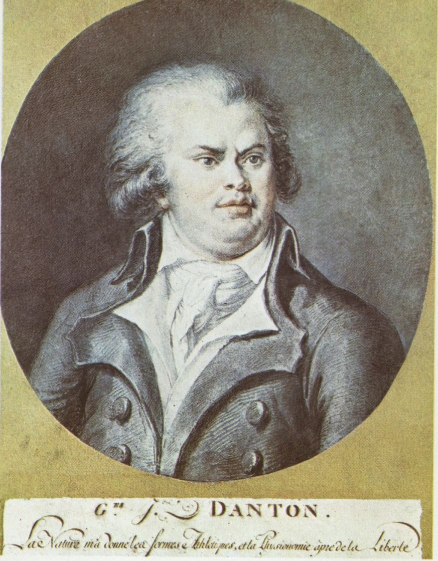 Georges Jacques Danton, portrait, musée des beaux-arts, Troyes, XVIIIe siècle.